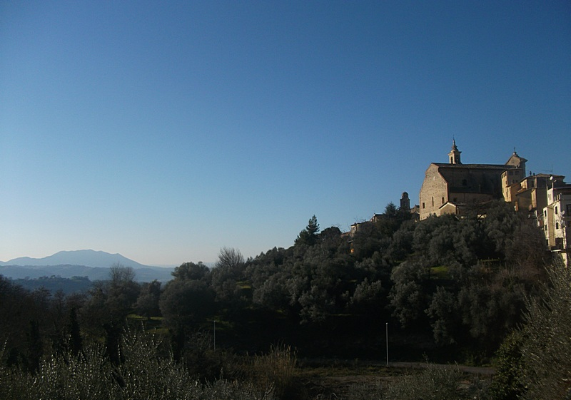 Poggio Mirteto-Panorama sul Monte Soratte.jpg